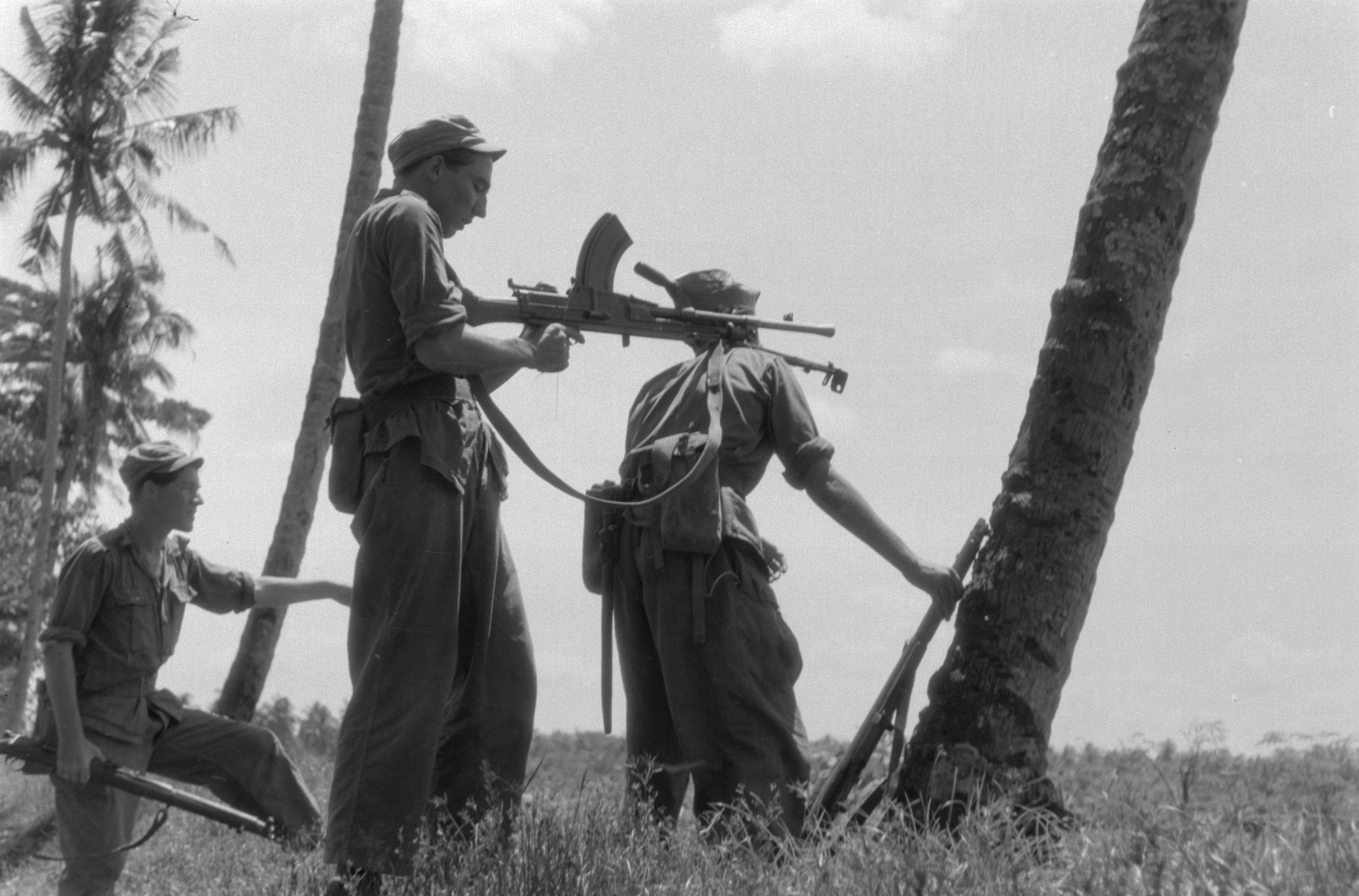 Collectie / Archief : Fotocollectie Dienst voor Legercontacten Indonesië Reportage / Serie : [DLC] 2-15 Regiment Infanterie en I-12 RVA in opmars Oost-Java Beschrijving : Drie Nederlandse militairen tijdens een actie. De brenschutter richt zijn wapen en gebruikt de schouder van een andere militair als stabilisatiesteun Datum : 20 december 1948 Locatie : Indonesië, Nederlands-Indië Fotograaf : Fotograaf Onbekend / DLC Auteursrechthebbende : Nationaal Archief Materiaalsoort : Negatief (zwart/wit) Nummer archiefinventaris : bekijk toegang 2.24.04.02 Bestanddeelnummer : 5561